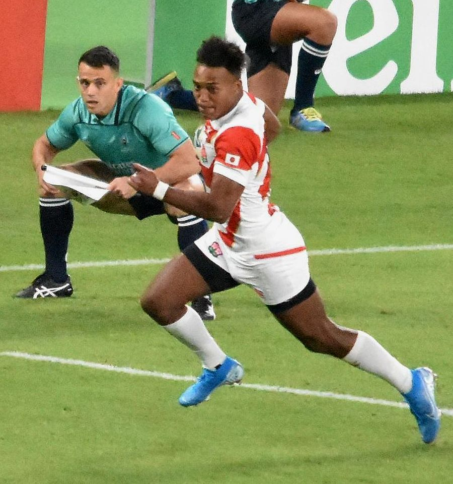 松島幸太朗